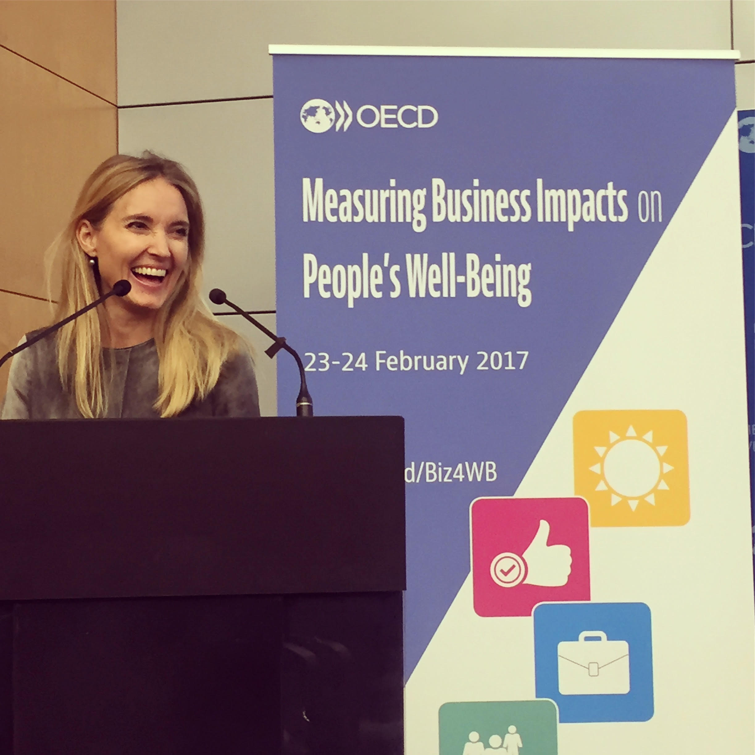 Malene Rydahl en conférence à l'OCDE en 2017